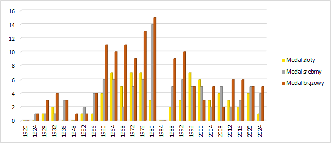 Wykres Polski na Letnich Igrzyskach Olimpijskich